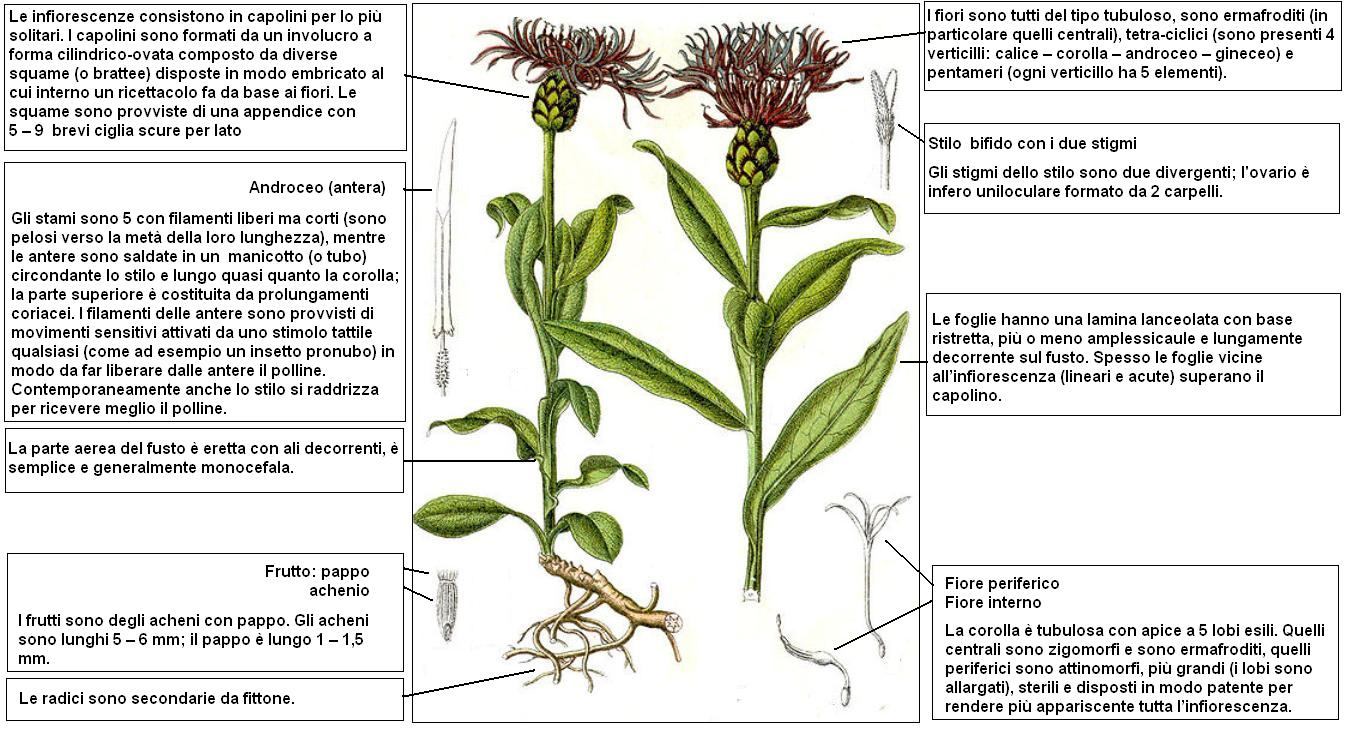 Cyanus montanus Sturm DESC